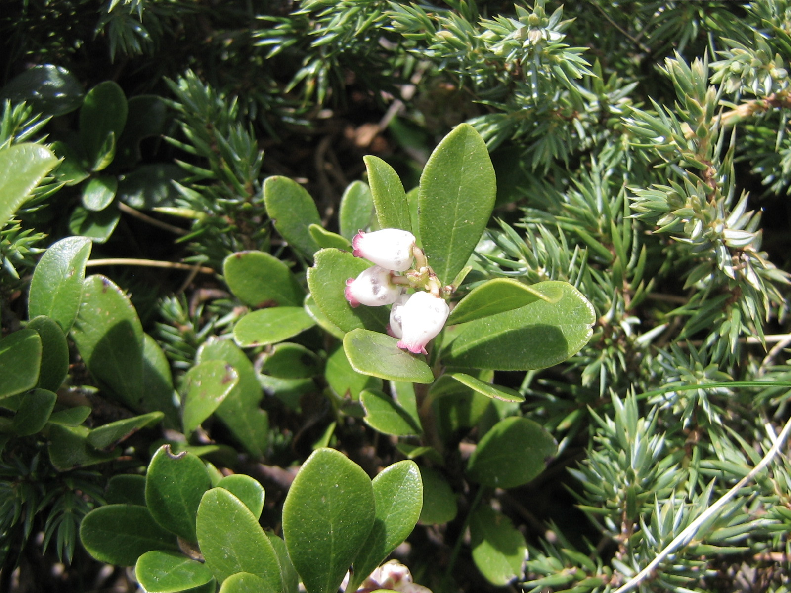 Raisin d'ours dans les Pyrénées (photo prise à une altitude d'environ 1800 m)